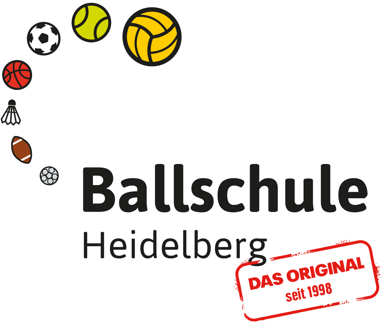 Das neue (geschützte) Logo der Ballschule Heidelberg